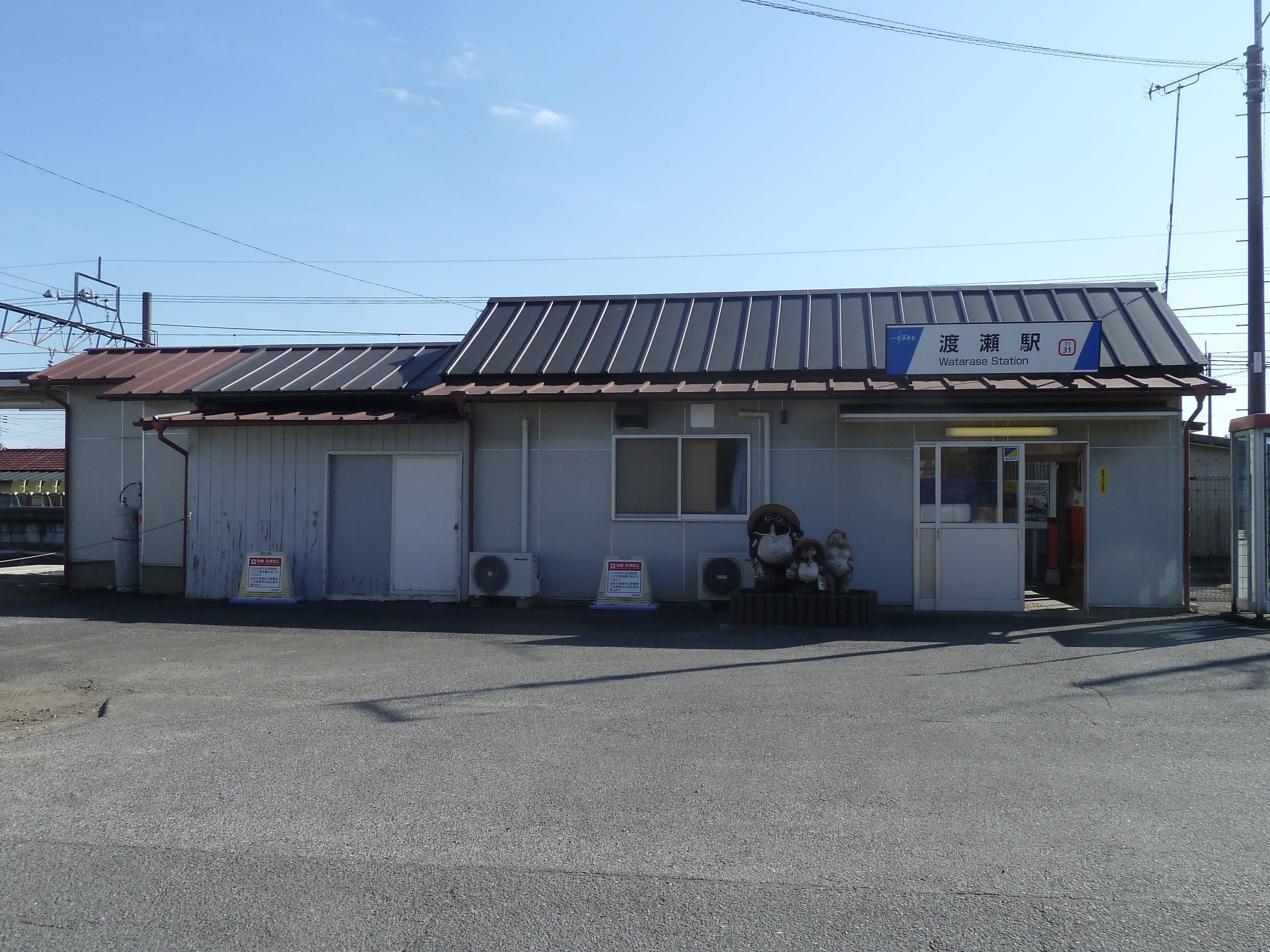 リニューアル後の渡瀬駅